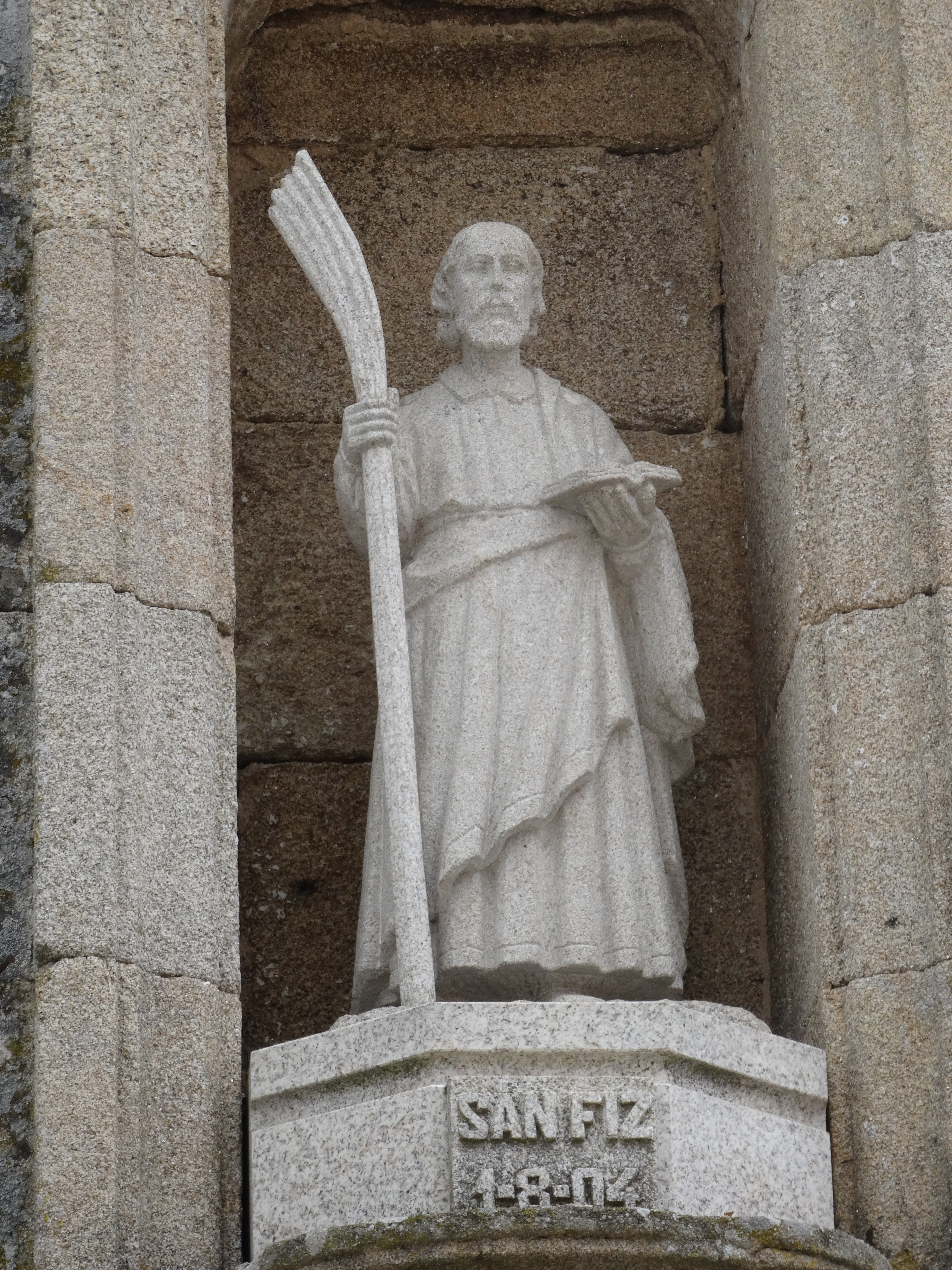 Ver título.